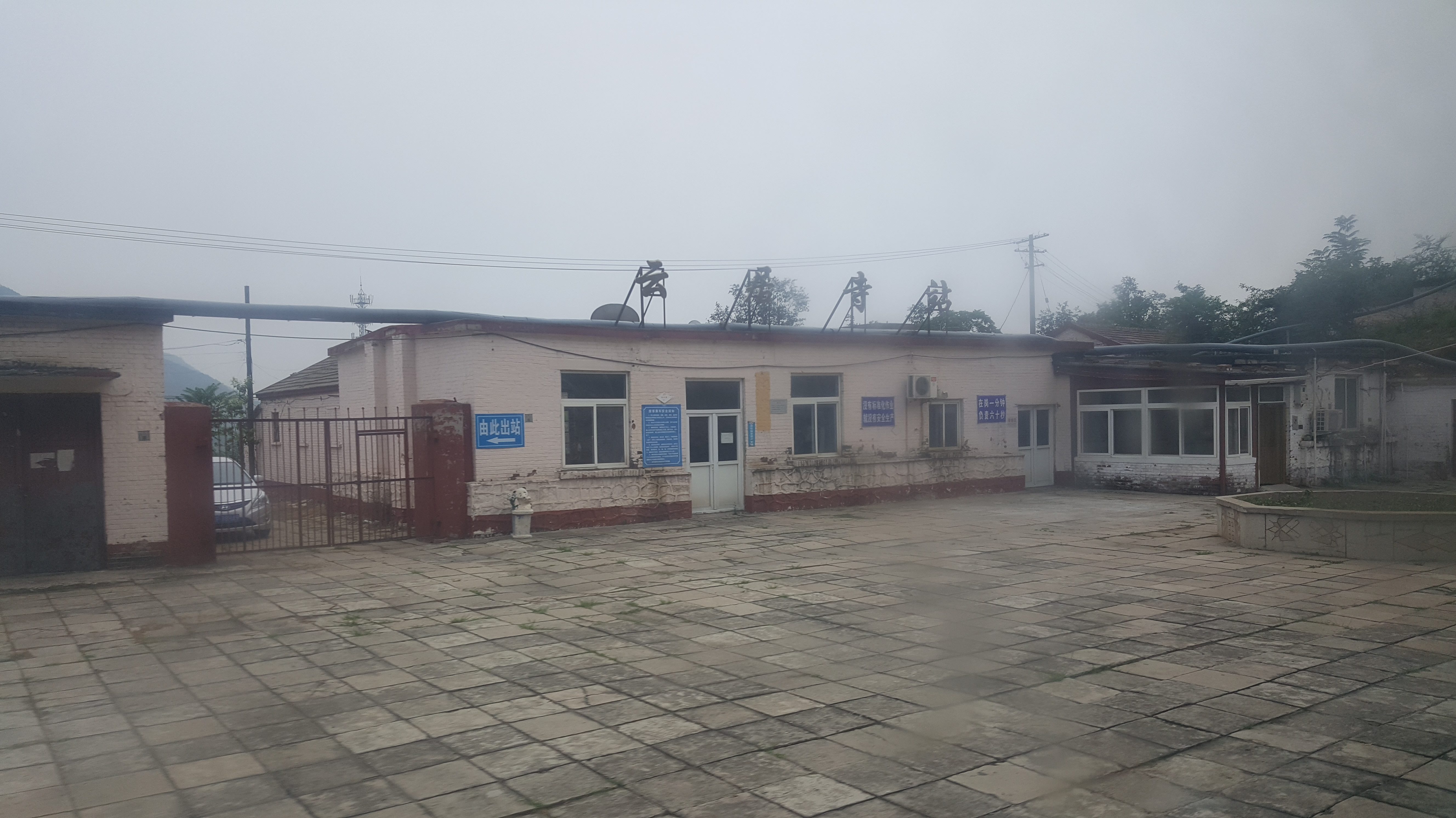 云居寺站站房